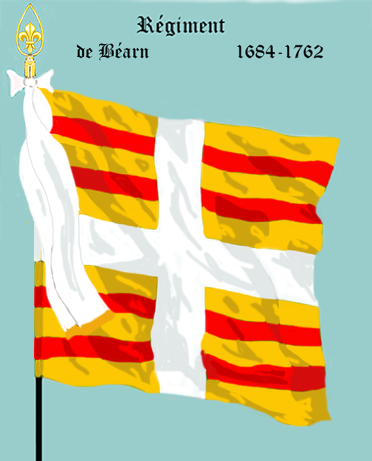 Ordonnanzfahne eines königlich französischen Infanterie-Regiments. - Entnommen und überarbeitet aus: „LES UNIFORMES ET LES DRAPEAUX DE L'ARMÉE DU ROI“ Marseille 1899. (Drapeau d'Ordonnance d' un régiment française d'infanterie royale.)